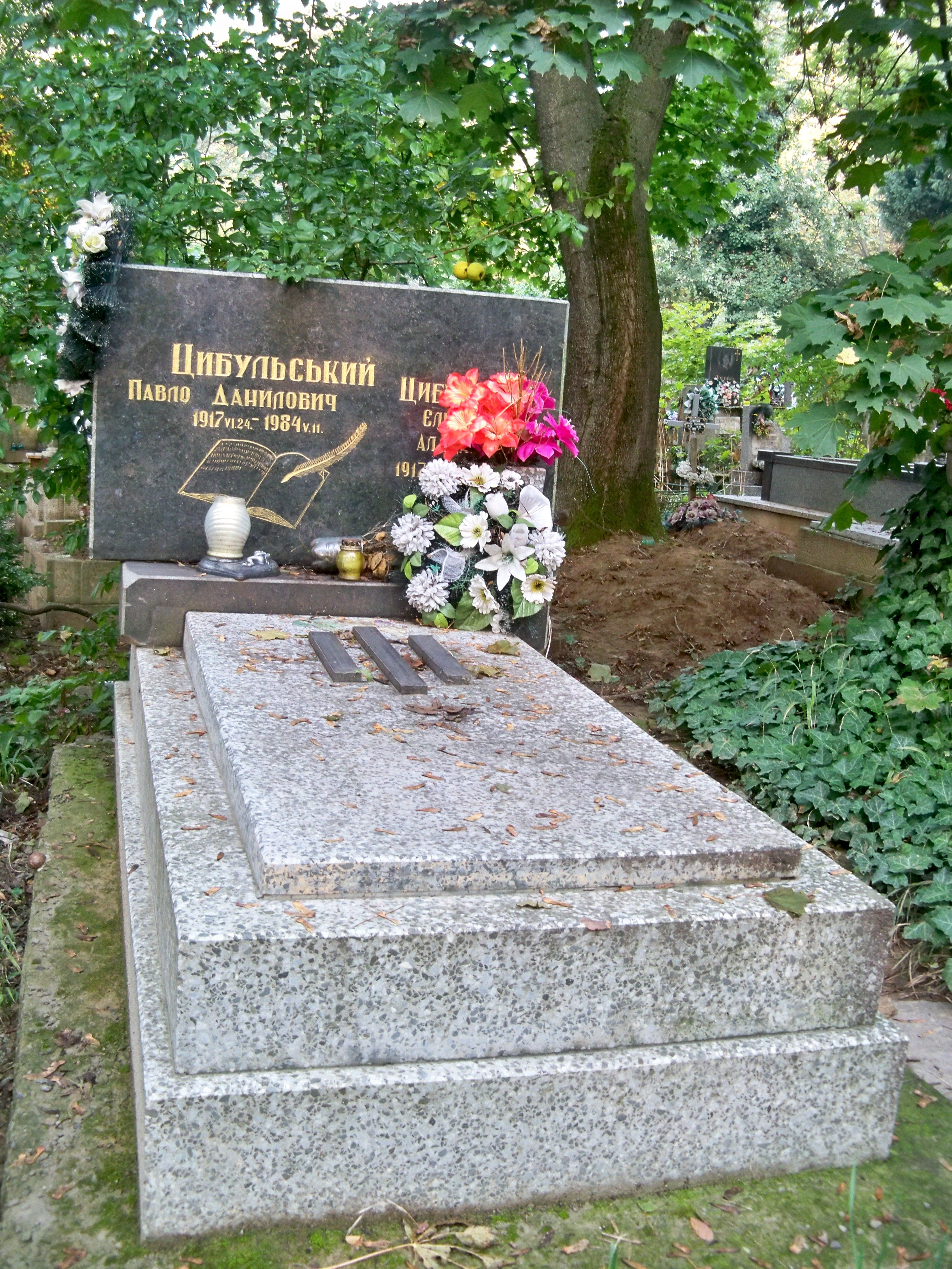 Могила П. Цибульського – закарпатського українського письменника, Ужгород, вул. Тиха